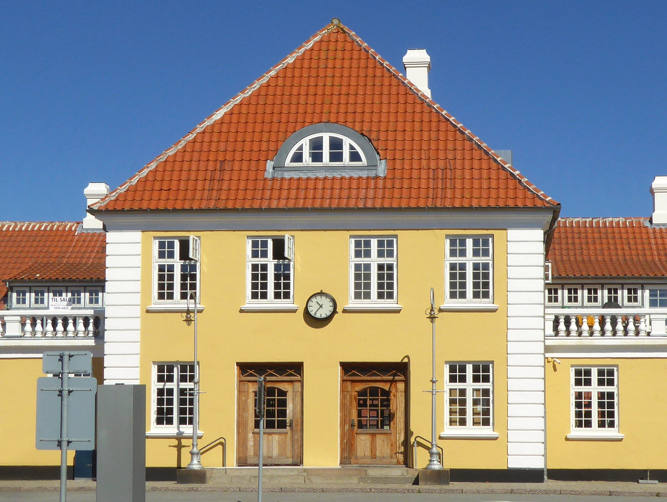 Der Bahnhof von 1919 in Skagen ist der nördliche Bahnhof von Dänemark - Foto 2018 Wolfgang Pehlemann P1220434